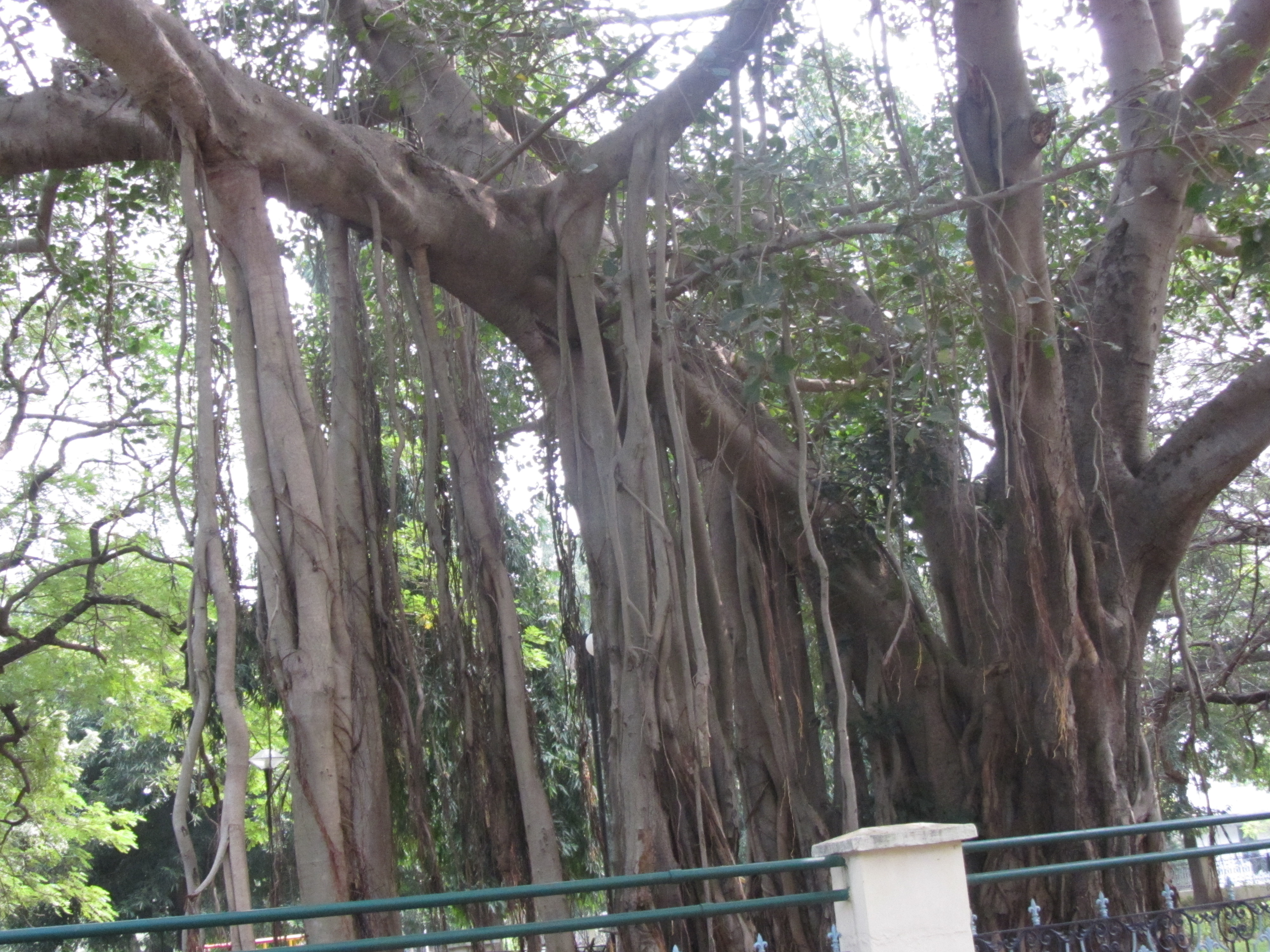 own creation - ஆலம்விழுது, அகன்ற கிளைகளைத் தாங்கும். ஆலும் வேலும் பல்லுக்கு உறுதி